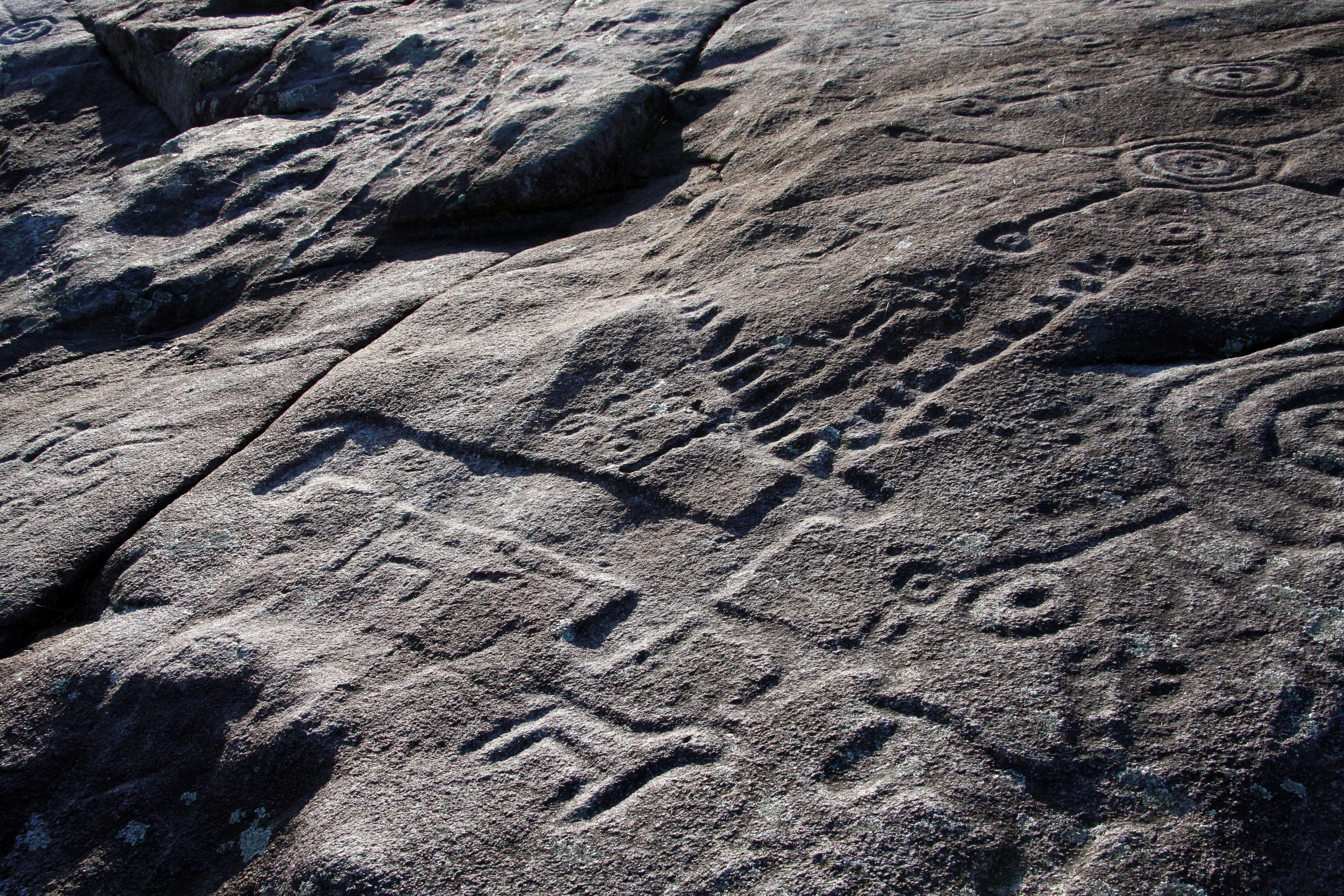 Detalle. Laxe das Cruces. Área Arqueológica de Tourón en Ponte Caldelas tiene una extensión de algo más de 150.000 metros cuadrados (ver plano). En su interior, se encuentra uno de los conjuntos de arte rupestre al aire libre más importantes de Galicia. Cinco estaciones visitables de diferente tamaño, ofrecen la posibilidad de contemplar una amplia variedad de petroglifos o gravados sobre la piedra (realizados entre el III/ II milenio a.c). Los petroglifos que se encuentran en el interior del Área son de diferentes motivos, y van desde los paneles más sencillos con cazoletas, combinaciones circulares o ciervos, hasta los espléndidamente complejos